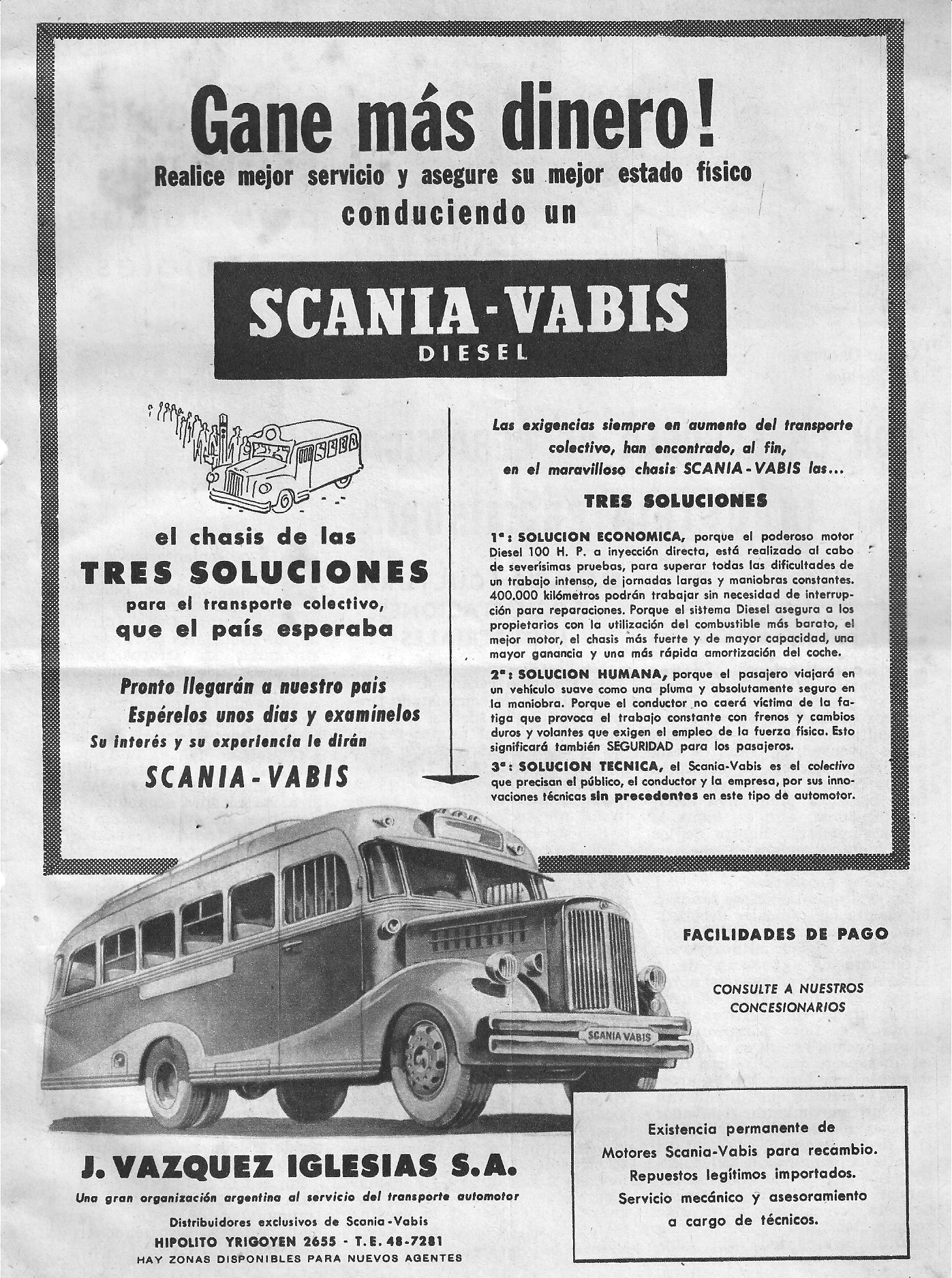 Propaganda de noviembre de 1956 de una revista argentina. Se trata de los "nuevos" Scania-Vabis que se utilizarían como Colectivos, en Buenos Aires.